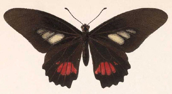 Papilio guaco = Mimoides ilus ilus (Fabricius 1793) (upperside)